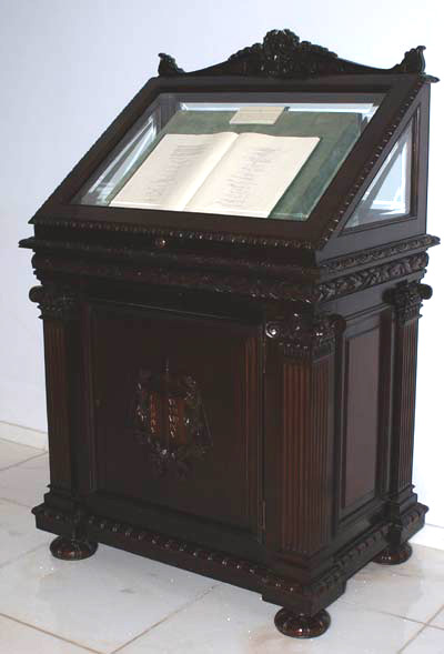 Móvel que guarda um exemplar original da Constituição de 1988 do Brasil no Museu do STF. Data: desconhecida Autor e Fonte: STF - Supremo Tribunal Federal [1] OBS: As fotos do STF podem ser usadas gratuitamente, devendo se dar os créditos devidos ao STF.